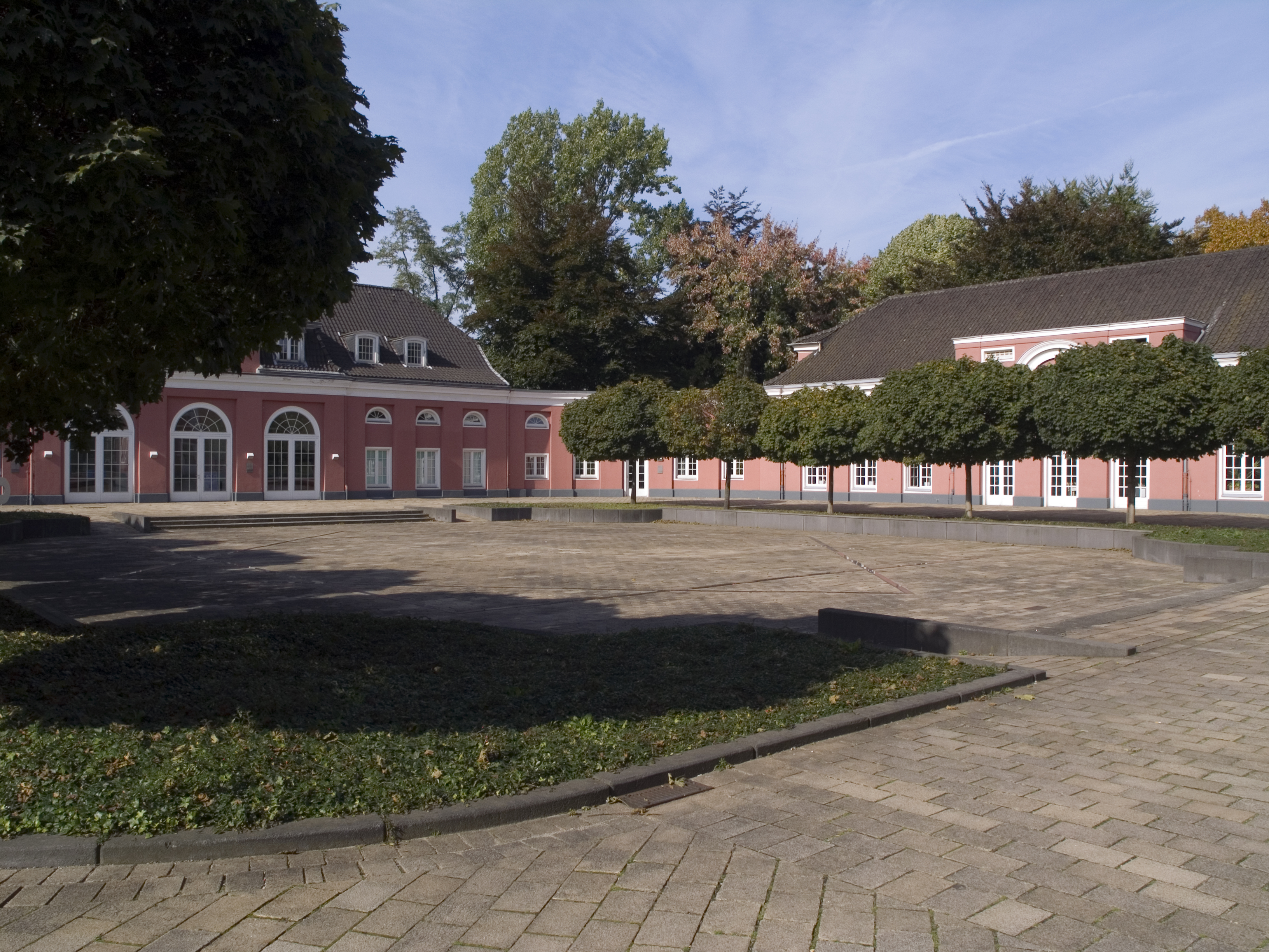 Северный Рейн-Вестфалия, Оберхаузен - замок Оберхаузен